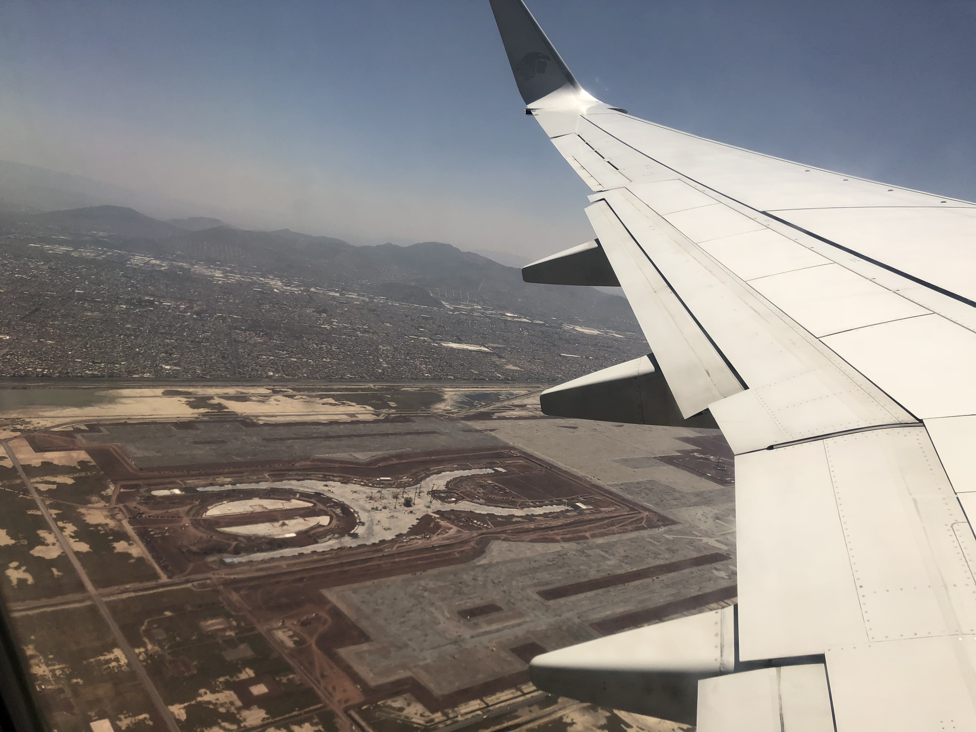 Vista aérea de la construcción del NAICM en Texcoco, Estado de México.